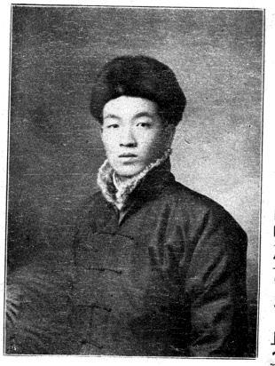 中文（台灣）: 中華民國國會議員